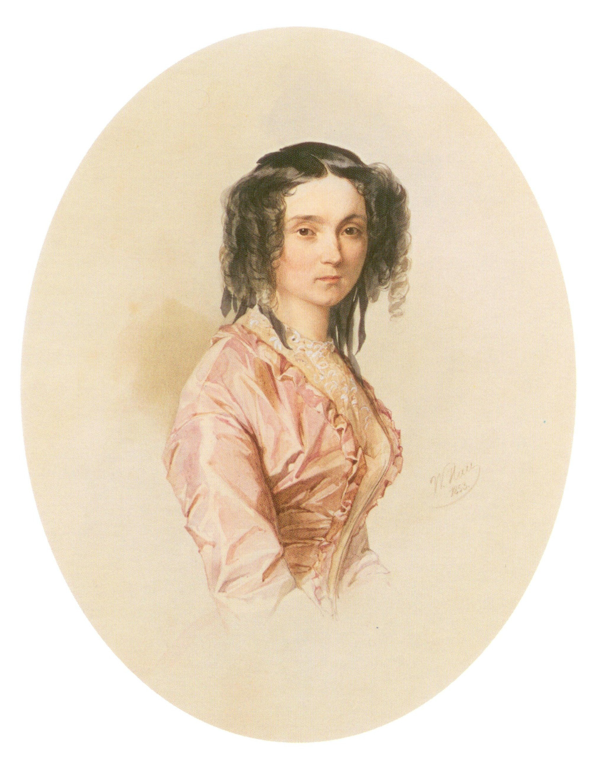 Княгиня Софья Никаноровна Долгорукова, урож. Хитрово (1819-1902), в первом браке за Н. И. Мясоедовым, во втором за кн. Д. И. Долгоруковым.